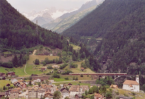 Wassen, Uri/Schweiz, Gotthardbahn, Mittlere Meienreussbrücke